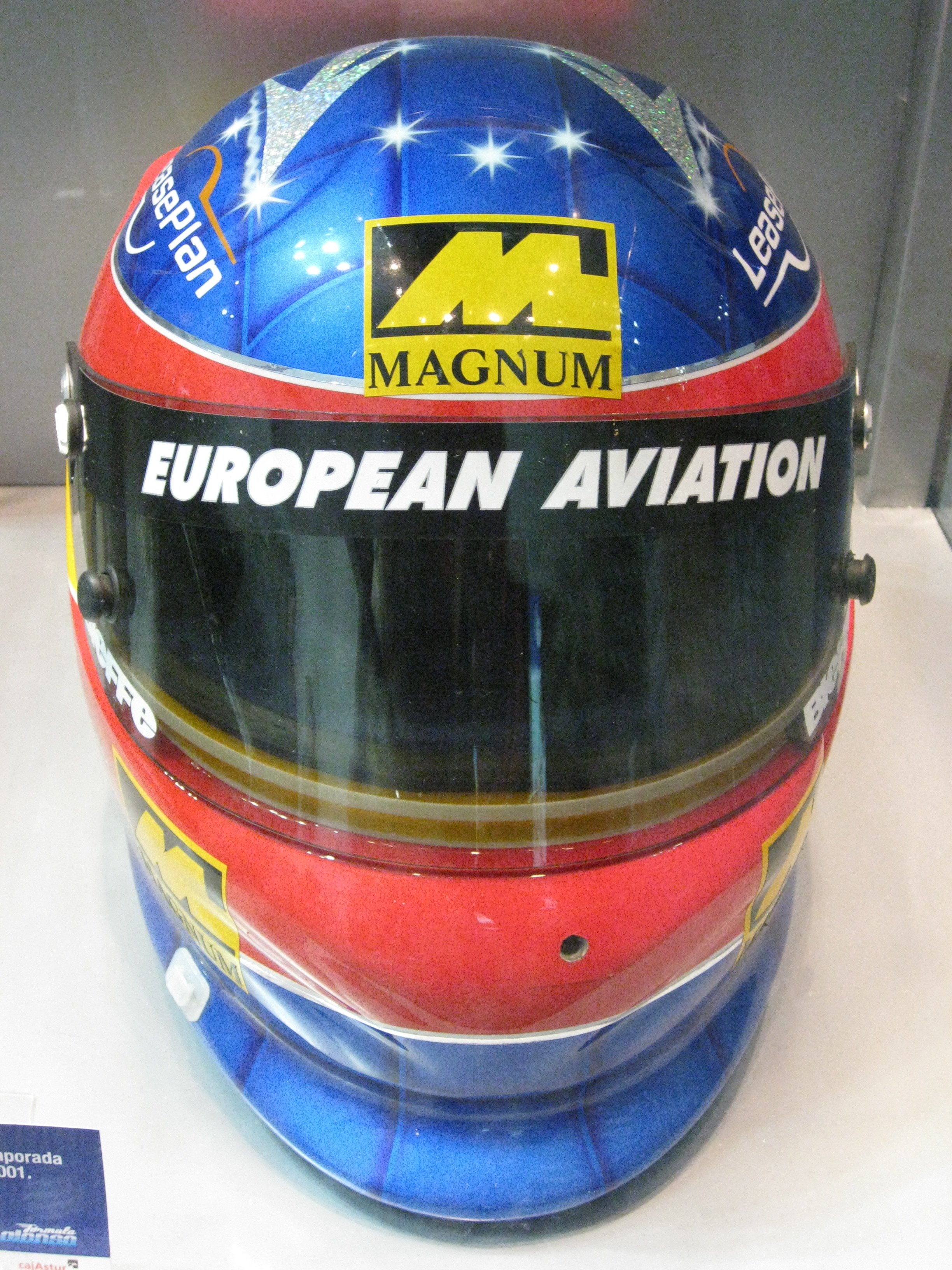 Casco de Fernando Alonso primera temporada en fórmula uno